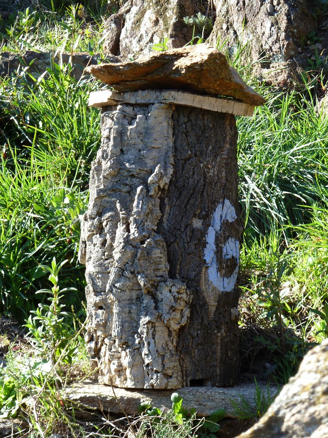 Ruche traditionnelle en liège appelée "brusc" en Provence. La Gard-Freinet - Var - France